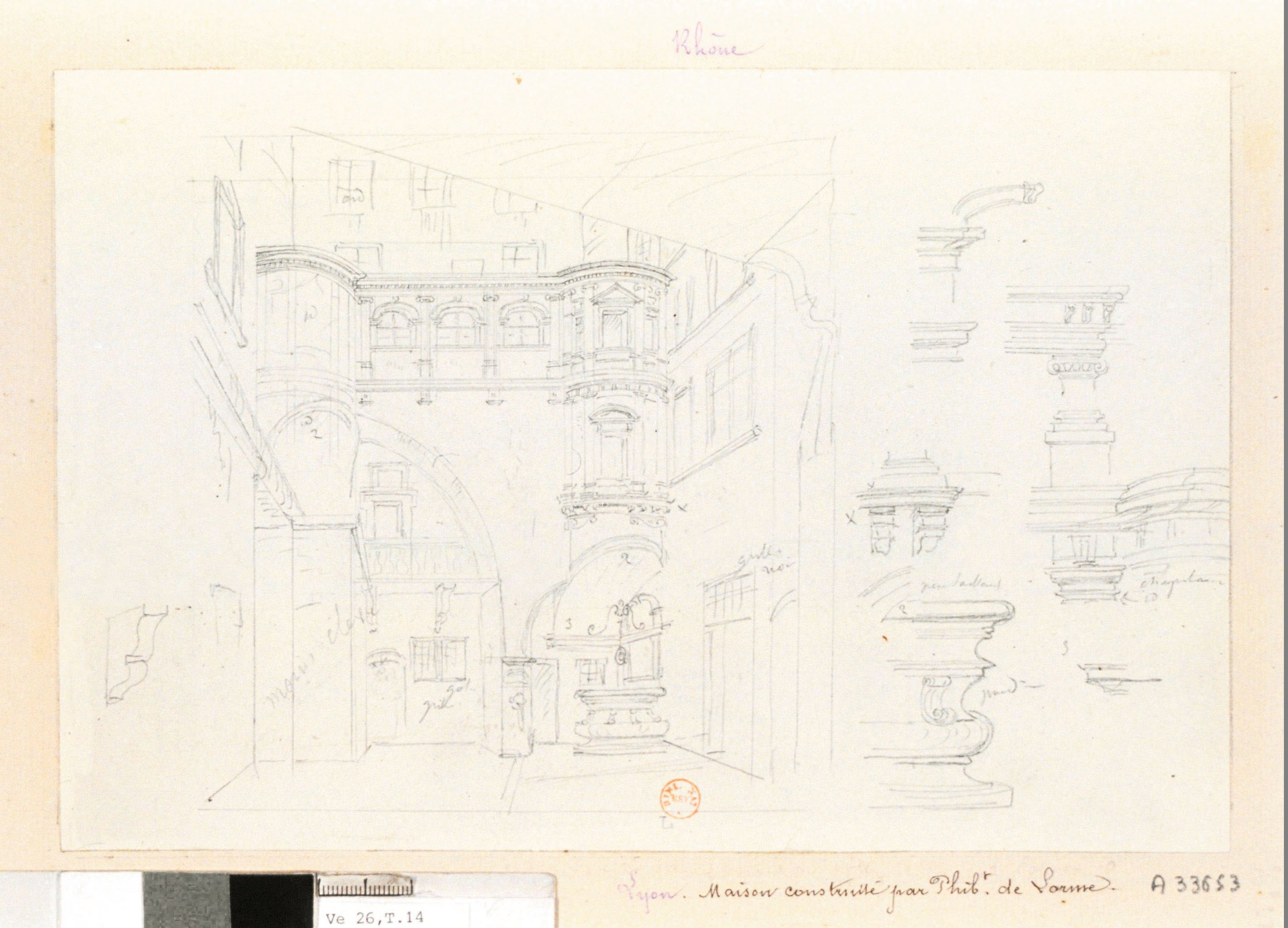 Galerie de l'hôtel Bullioud par Philibert Delorme A partir de Bibliothèque nationale de France Auteur(s) : Jolimont, François-Gabriel-Théodore Basset de. Dessinateur Titre(s) : [Lyon. Maison construite par Philibert Delorme. Cour et détails de l'Hôtel Bullioud] :[Image fixe numérisée] : [dessin] / [François-Gabriel-Théodore Basset de Jolimont] Publication : [Avant 1832] Description matérielle : Dessins à la mine de plomb ; 16,8 x 25,1 cm Note(s) : Lithographié par Jolimont dans "Description historique et critique et vues pittoresques :des monuments les plus remarquables de la ville de Lyon", Lyon, 1832 . - Cote : BNF Richelieu Estampes et photographie Rés. Ve-26s-Fol. Destailleur Province, t. 14, n. :3382 . microfilm A033653 Autre(s) auteur(s) : Destailleur, Hippolyte (1822-1893). Donateur Sujet(s) : Delorme, Philibert -- Oeuvres Vues d'architecture -- 18e siècle Puits Galeries (architecture) Ordre ionique Lyon (Rhône) -- Hôtel Bullioud -- Galerie Philibert Delorme Notice n° : FRBNF38647297